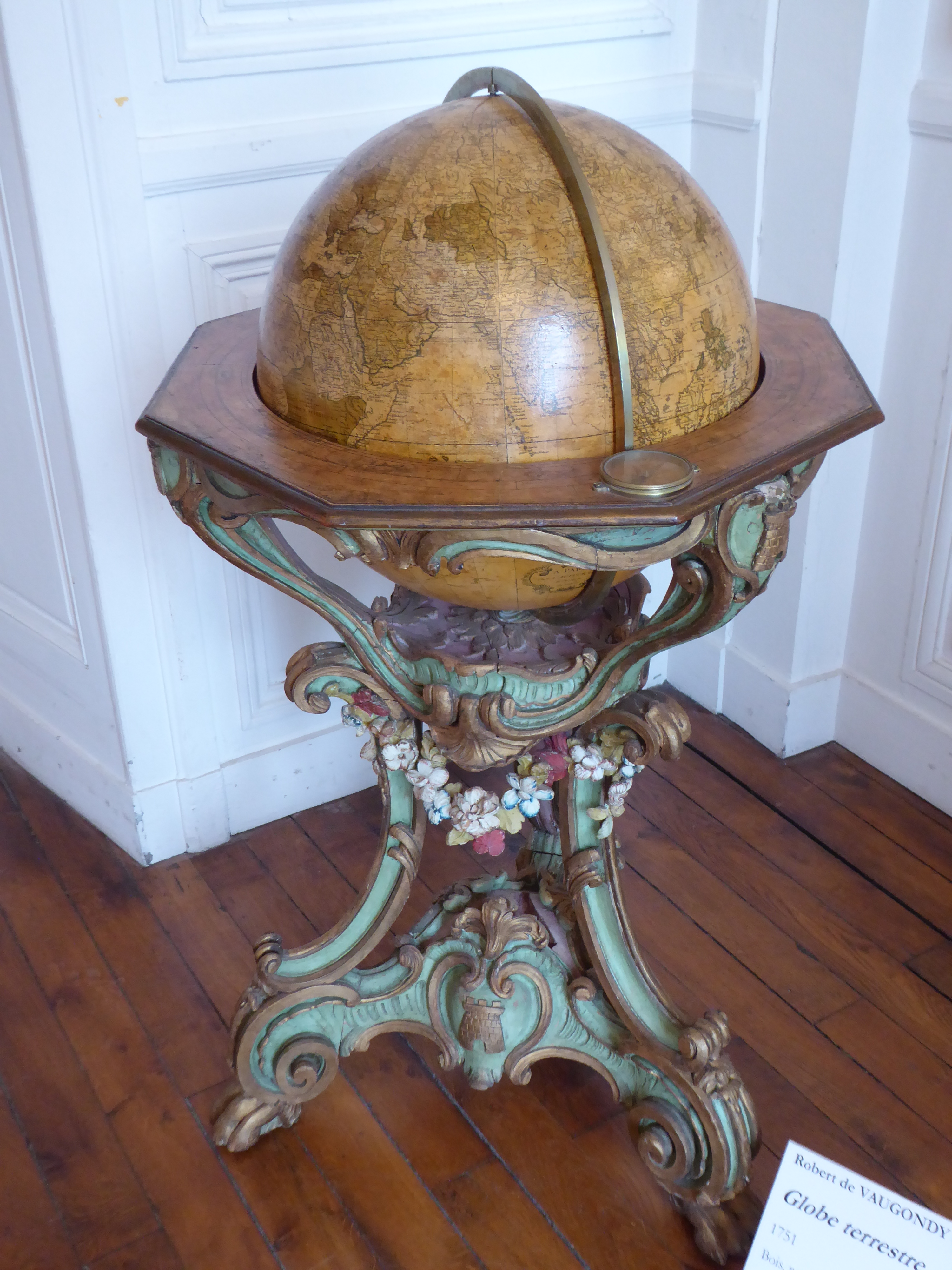 Globe terrestre de Vaugondy (1751), musée des beaux-arts de Chartres, Eure-et-Loir, France. Provenance : collection de Mme de Pompadour au château de Crécy.